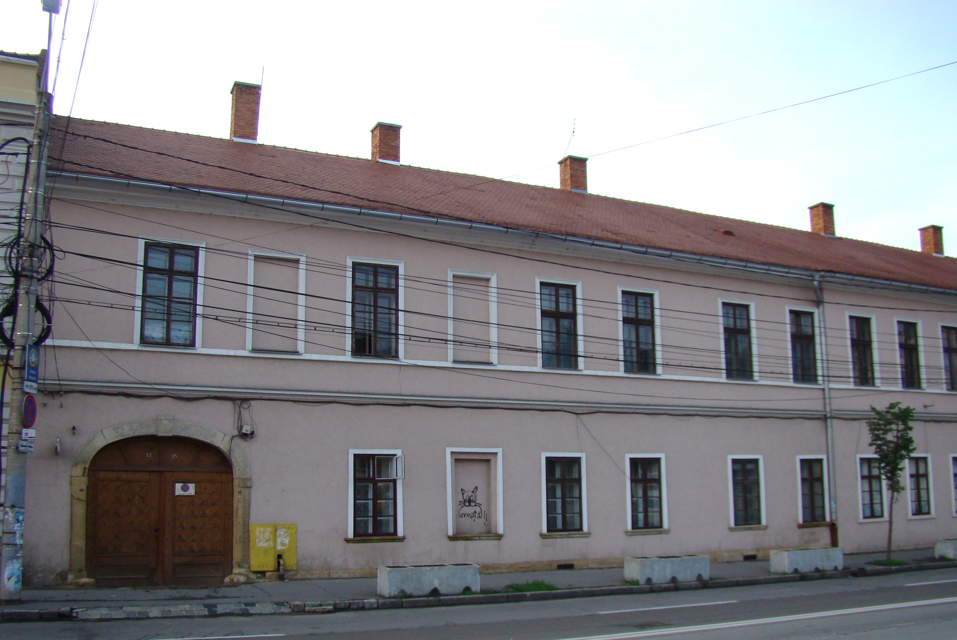 Clădire monument istoric, strada Avram Iancu nr.13-15